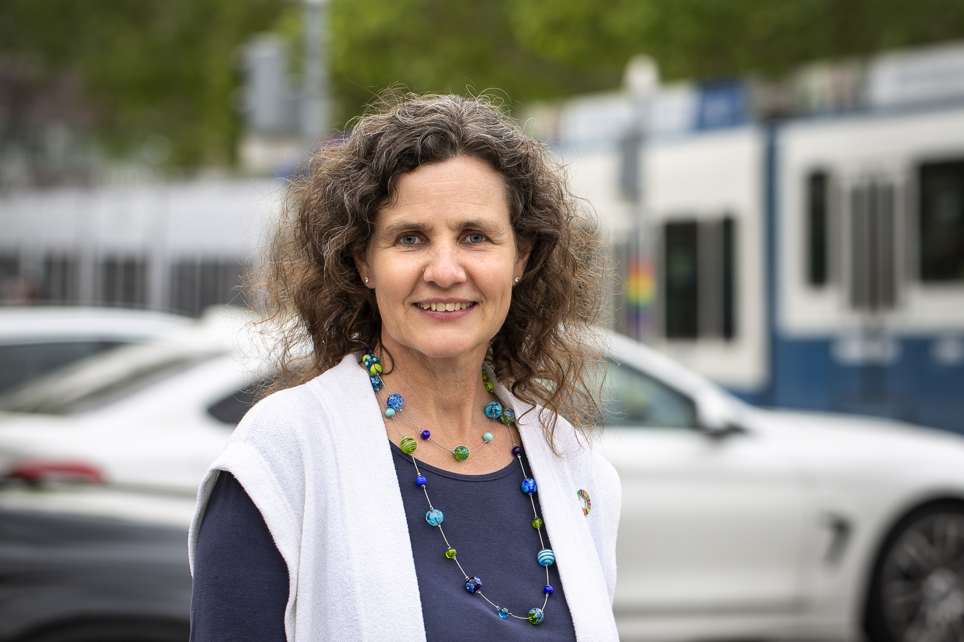 Portrait von Barbara Schaffner im Sommer 2019 vor den Nationalratswahlen des Kantons Zürich.